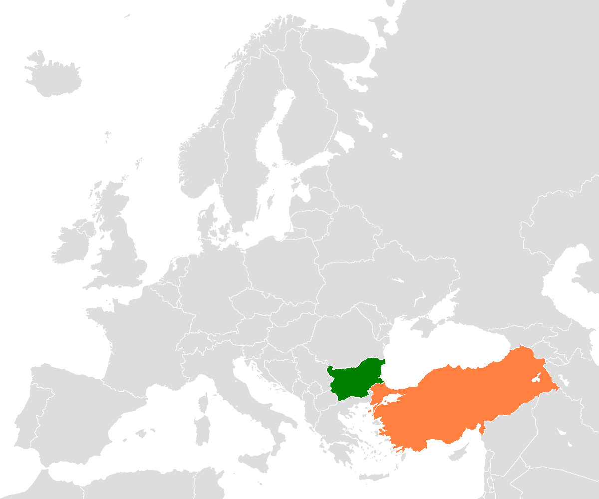 İngilizce Wiki'deki telif hakkı serbest olan bir harita değişikliğe uğratıldı. değiştirildi.